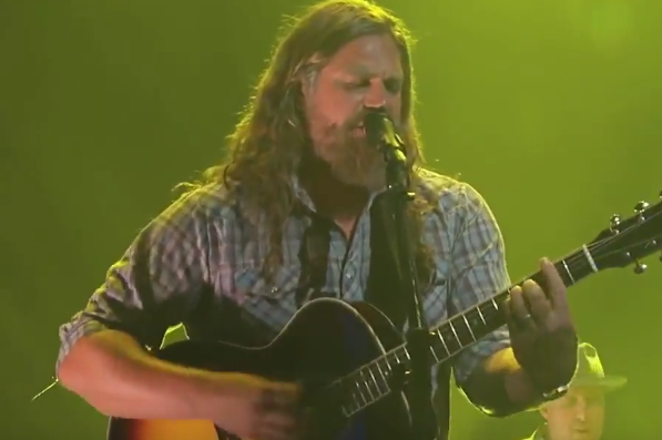 The White Buffalo (James Smith) fremfører "The Whistler" live på det amerikanske TV-programmet Jimmy Kimmel Live.